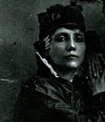 Nicola ed Elvira Notari (anni 1920) Foto tratta da Kinomata. La donna nel cinema, a cura di Annabella Miscuglio e Roni Daoupulo, Dedalo Libri, 1980